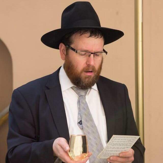 הרב כלב קרלין